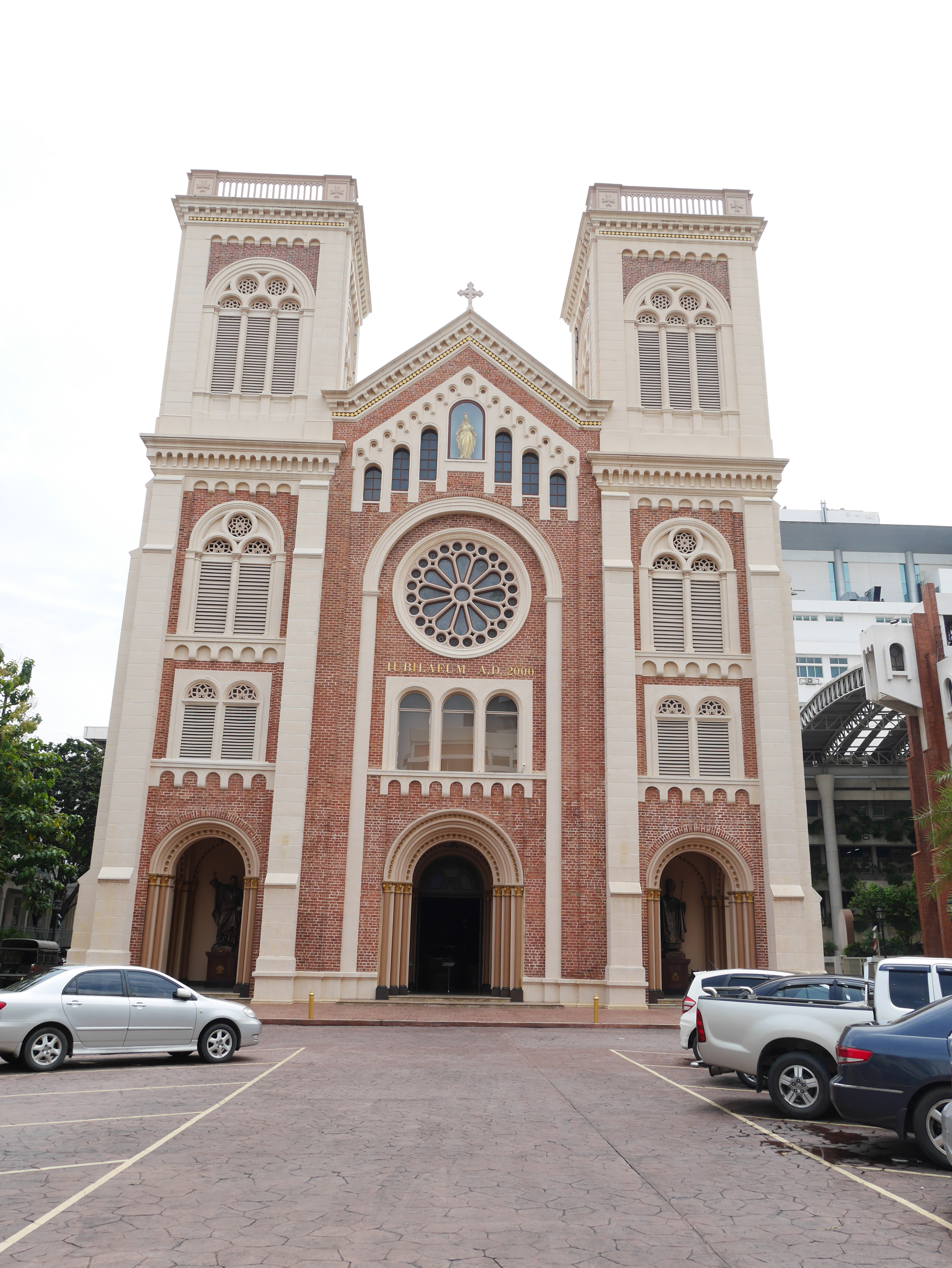 อาสนวิหารอัสสัมชัญ